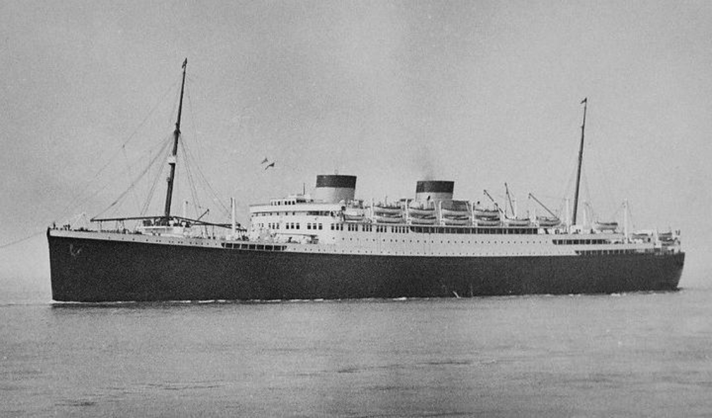 MV Georgic